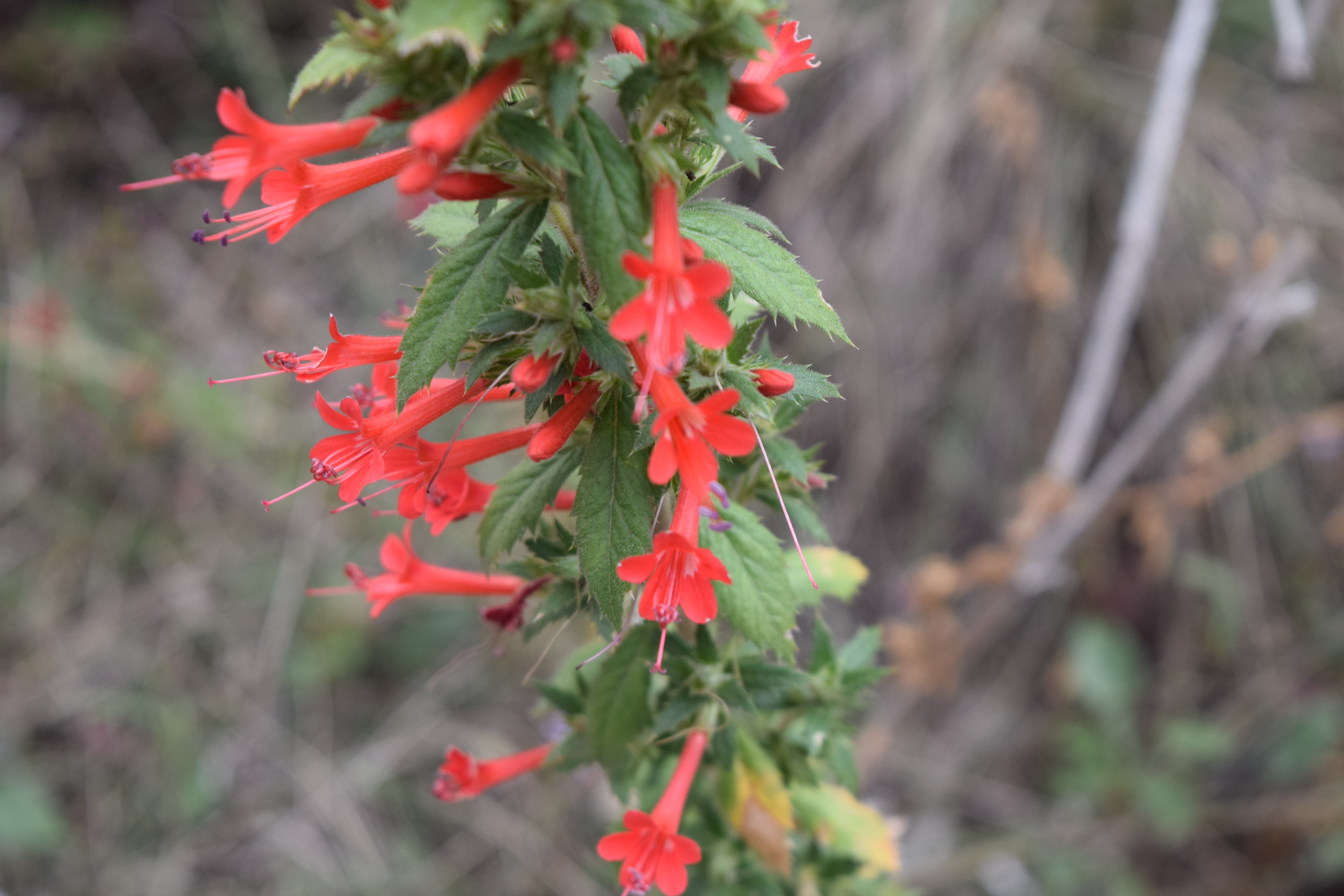 Loeselia mexicana En San Pablo Tecalco